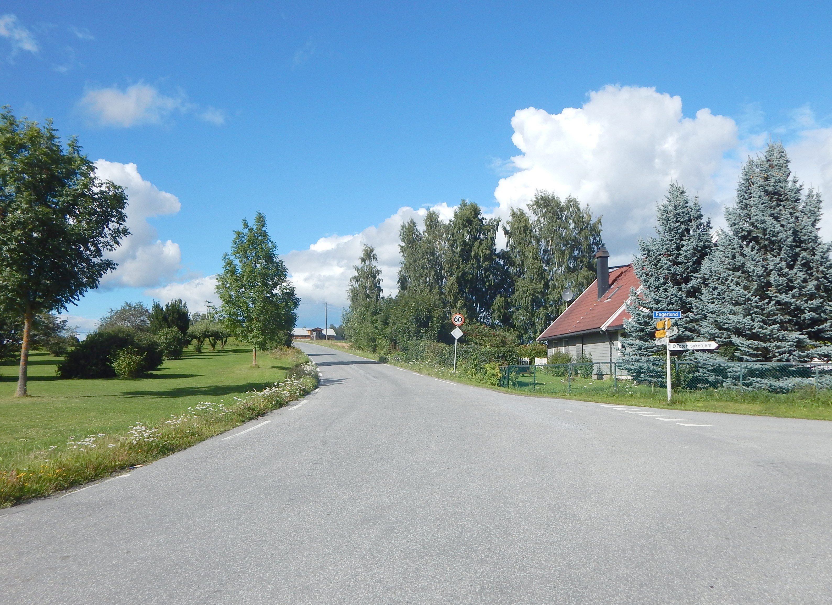 Nordlivegen ved Fagerlund